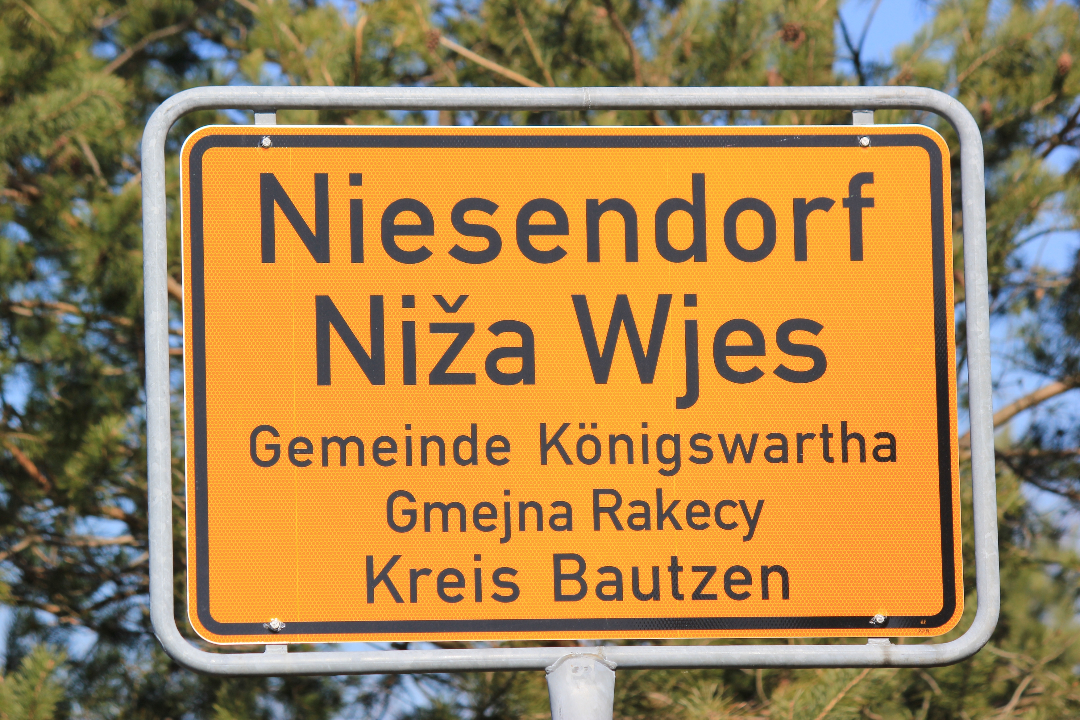 Hornjoserbsce: Wjesna tafla w Nižej Wsy